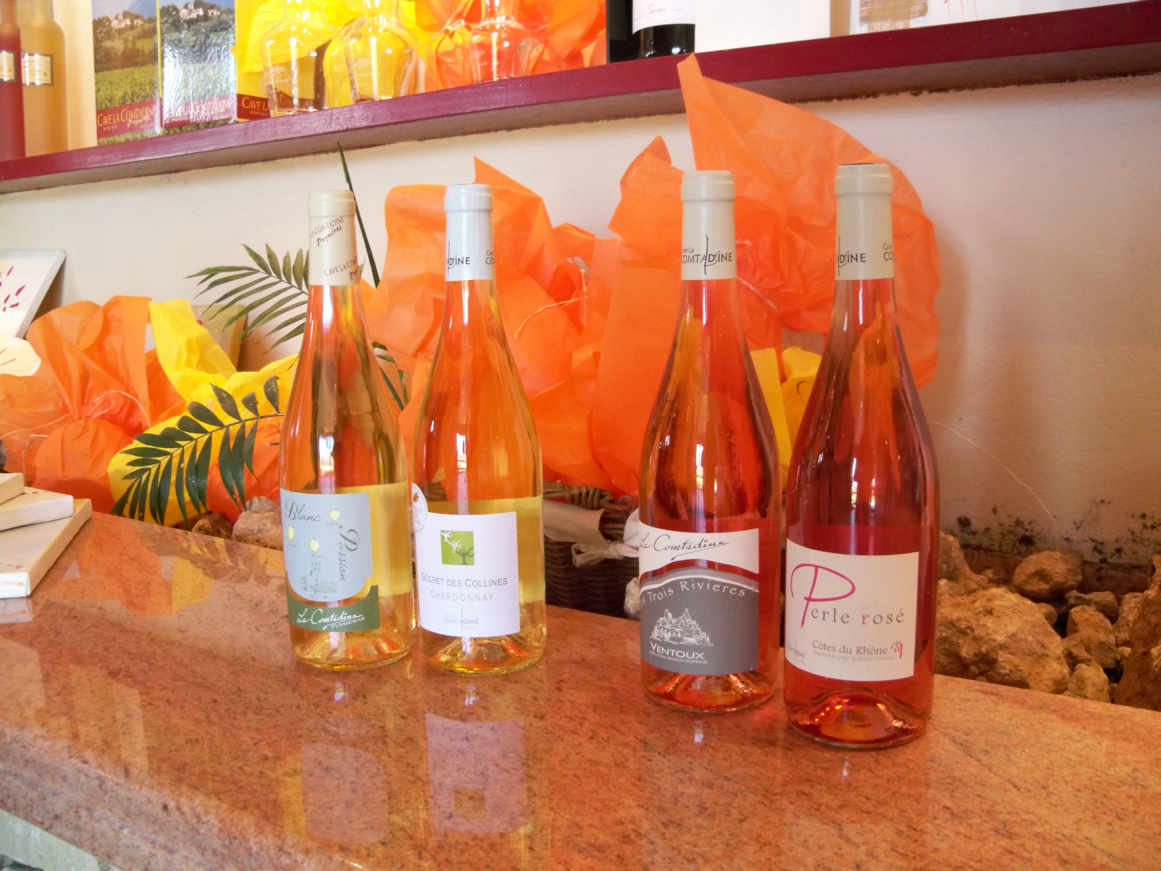 Vins de la Cave la Comtadines à Puyméras, Vaucluse